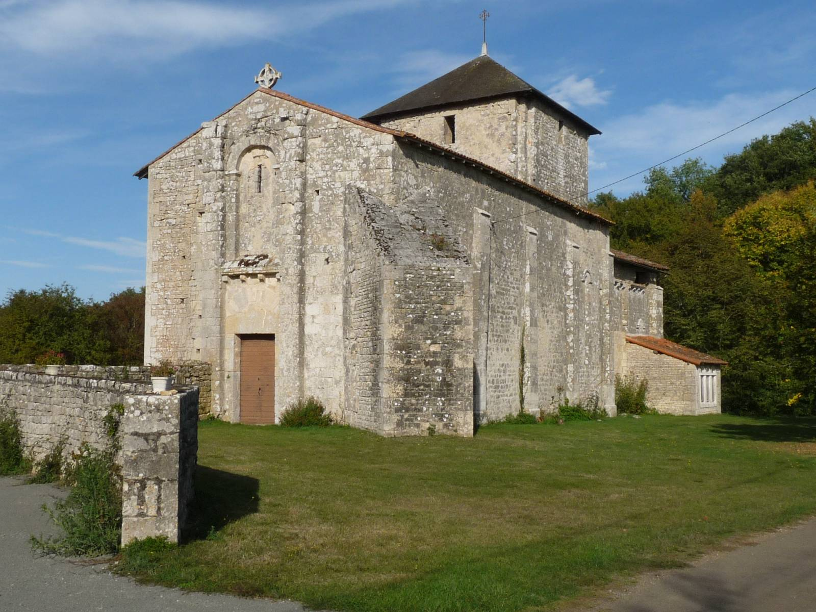 église de Vieux-Ruffec, Charente, France